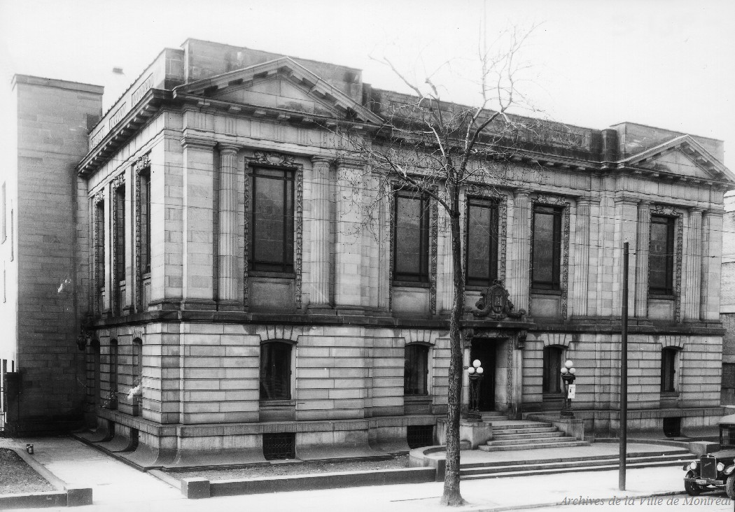 Bibliothèque Saint-Sulpice, 1700, rue Saint-Denis, Montréal